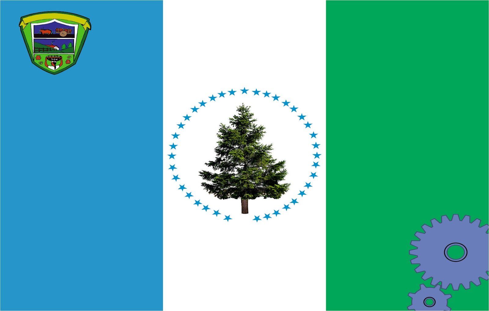 Bandera del Municipio de Siguatepeque